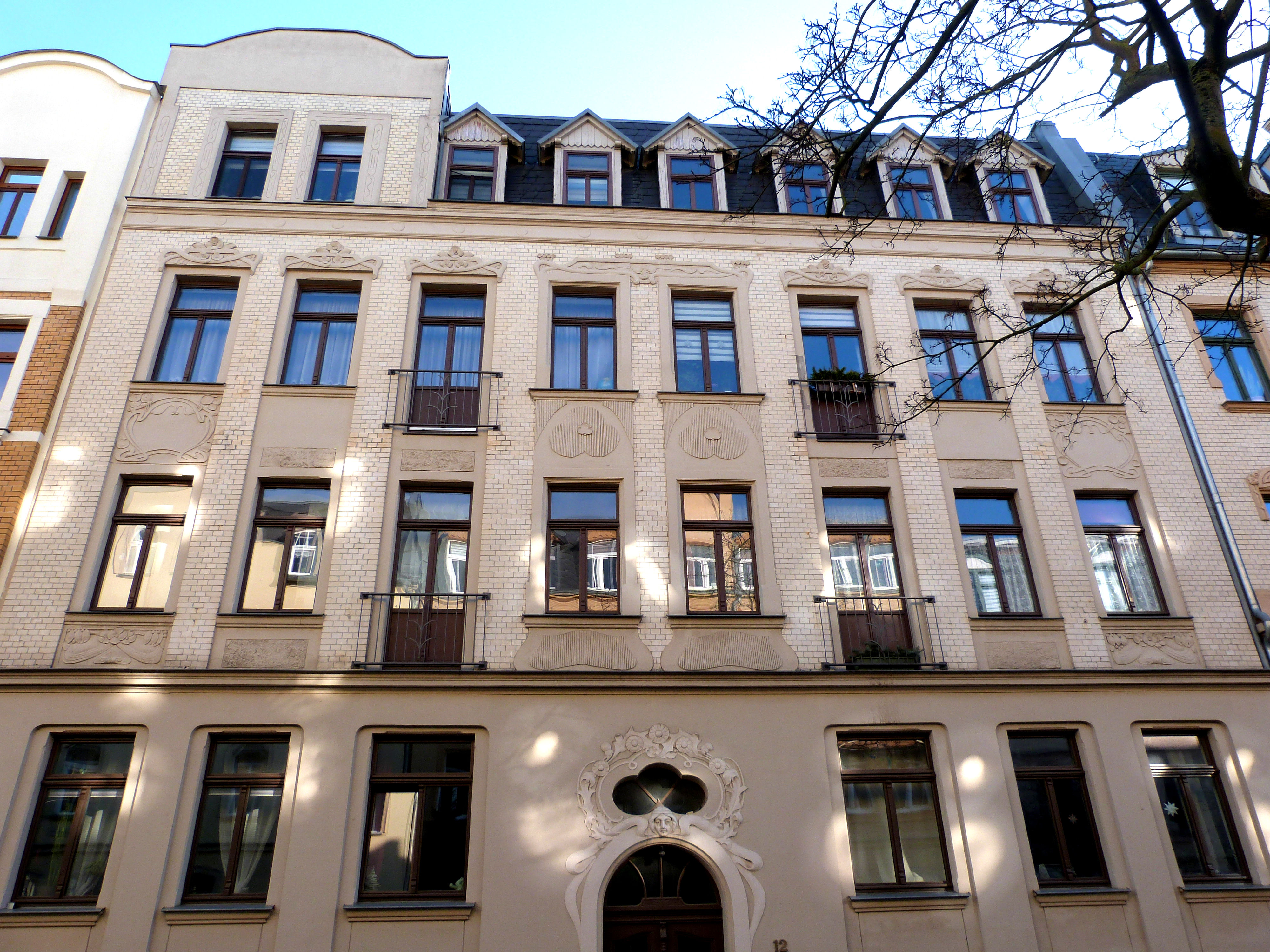 Rudolf-Haym-Straße 12, Halle (Saale)